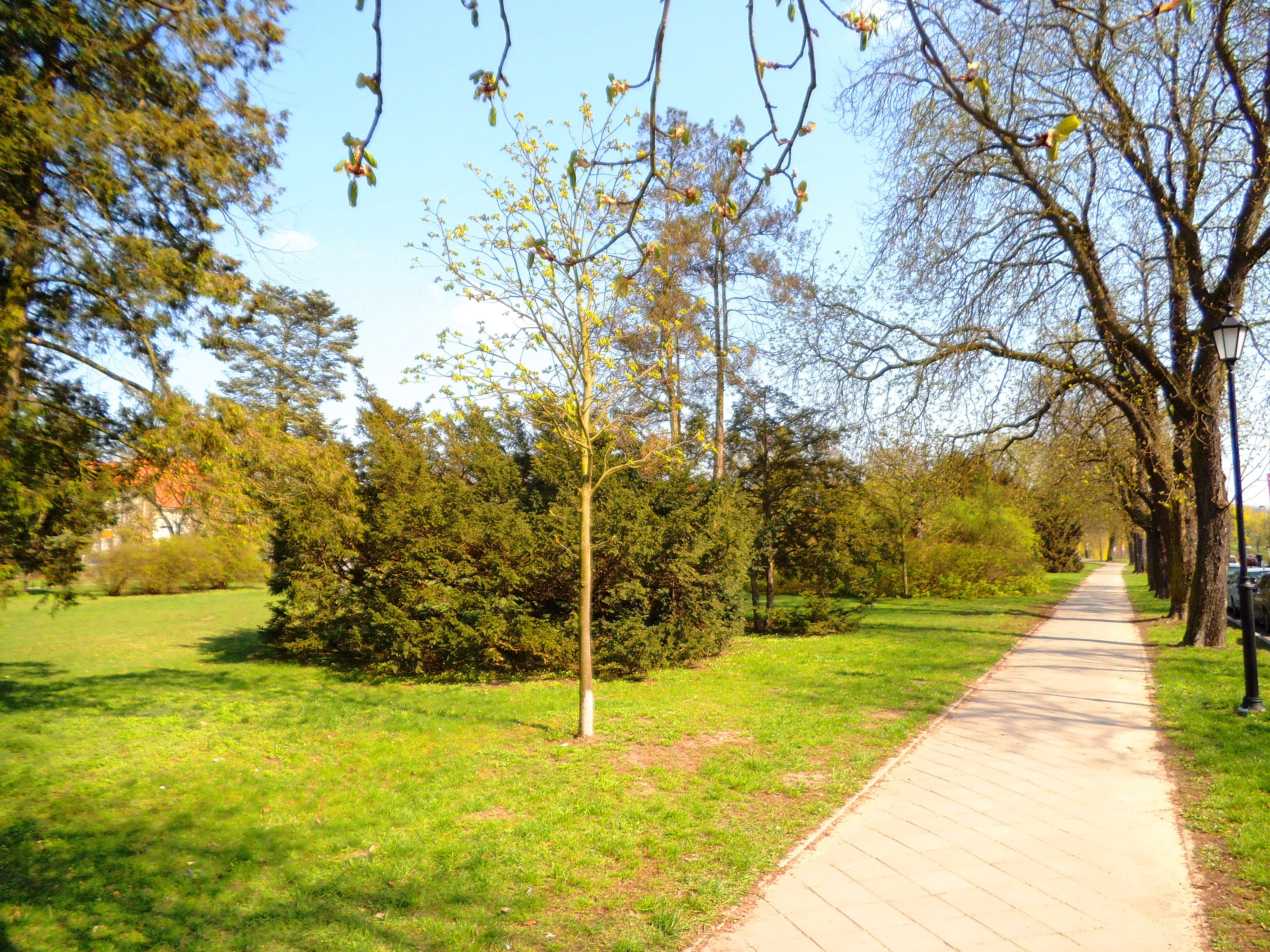 Ogród Muzyków, wiosna 2017 rok